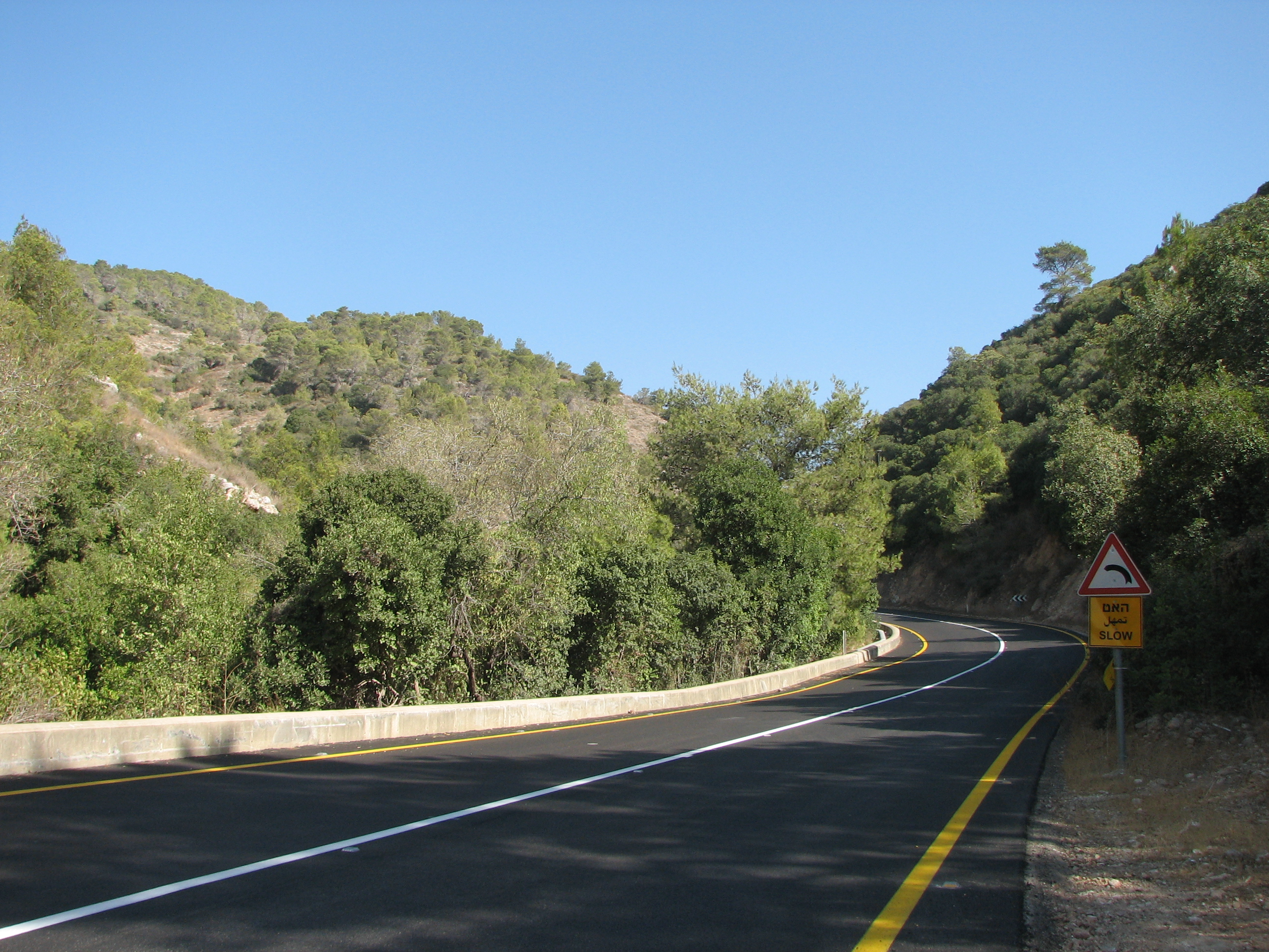 Oren Wadi - Mount Carmel Israel נחל אורן זורם בהר הכרמל כביש 721 במעלה נחל אורן